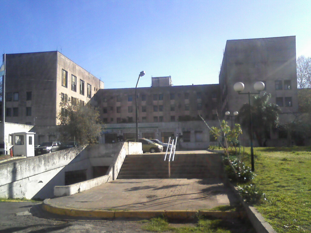 Hospital Municipal José Tiburcio Borda. Dr. Ramón Carrillo 375, Buenos Aires, Argentina.